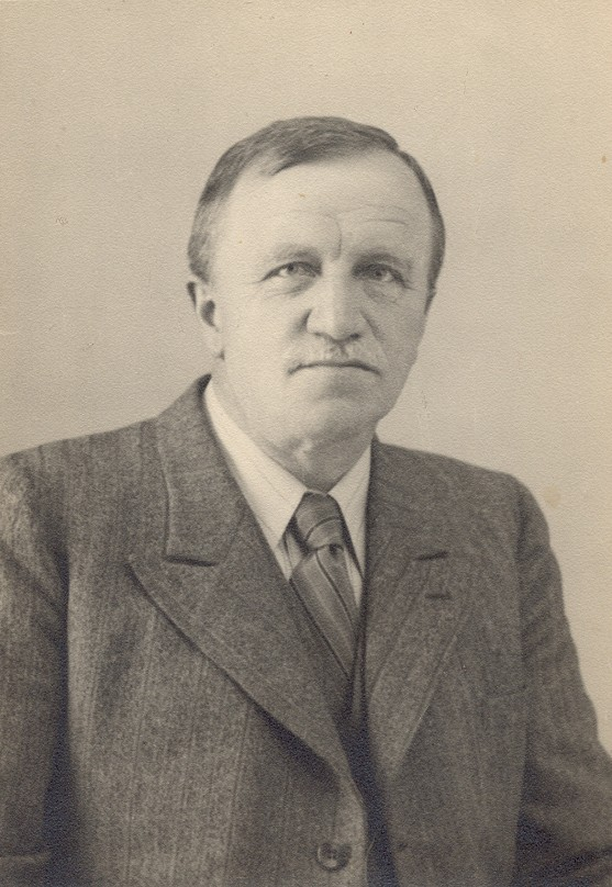 Jakob Vetsch (* 15. Mai 1886 in Grabs SG; † 5. April 1944 in Buchs SG) war Bezirksammann des ehemaligen St. Galler Bezirkes Werdenberg in der Schweiz (Sohn von Gemeinderatsschreiber David Vetsch, 1863-1924; Vater von Regierungsrat Florian Vetsch, 1921-1972). - Das Porträt stammt aus dem Fotohaus Fredy Buchmann, Buchs SG